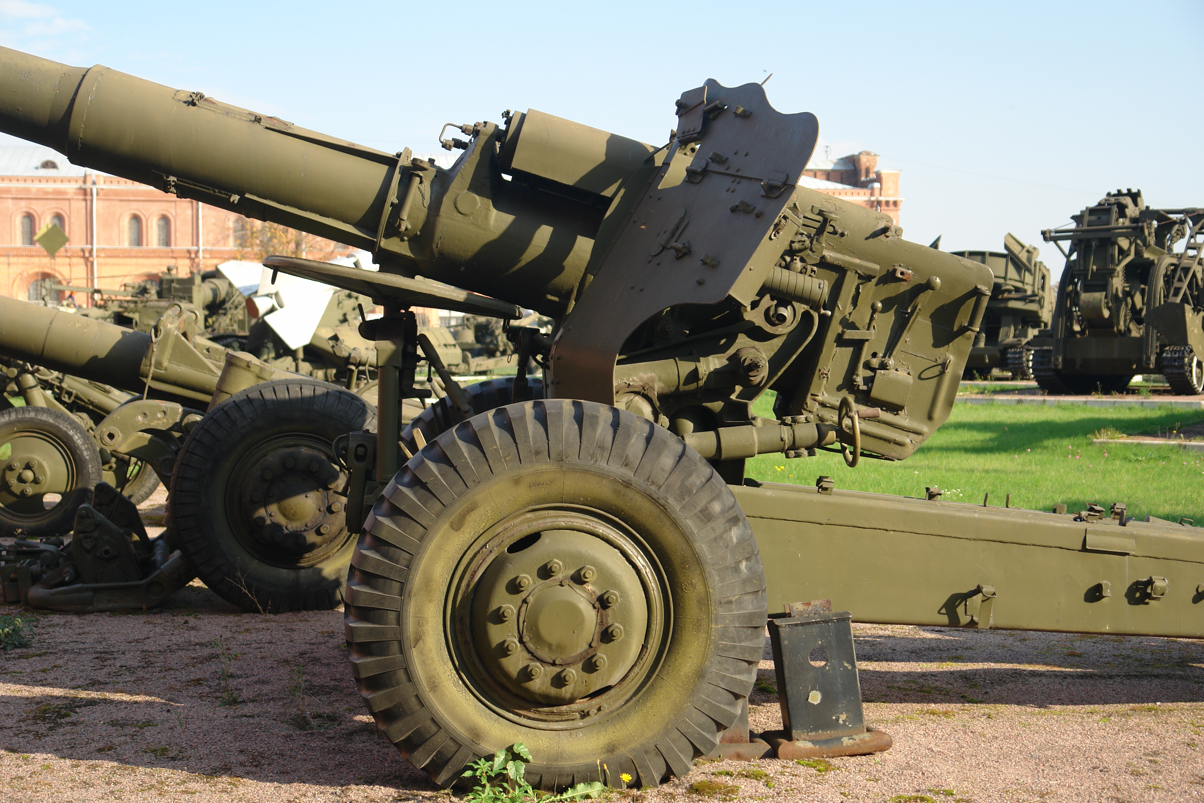 152-мм ПУШКА-ГАУБИЦА Д-20 (1954) ГЛАВНЫЙ КОНСТРУКТОР Ф.Ф.ПЕТРОВ. ДУПЛЕКСНАЯ СИСТЕМА С 122-ММ ПУШКОЙ Д-74. ДАЛЬНОСТЬ СТРЕЛЬБЫ-17410 М. СКОРОСТРЕЛЬНОСТЬ - 5-6 ВЫСТР/МИН. МАССА, КГ: ОРУДИЯ-5650, СНАРЯДА-44. РАСЧЕТ - 8 ЧЕЛОВЕК. Военно-исторический музей артиллерии, инженерных войск и войск связи, Санкт-Петербург.